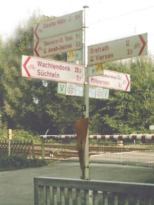 Ein Fahrrad-Wegweiser vor einem Bahnübergang in Viersen-Clörath, Kreis Viersen, NRW, Deutschland